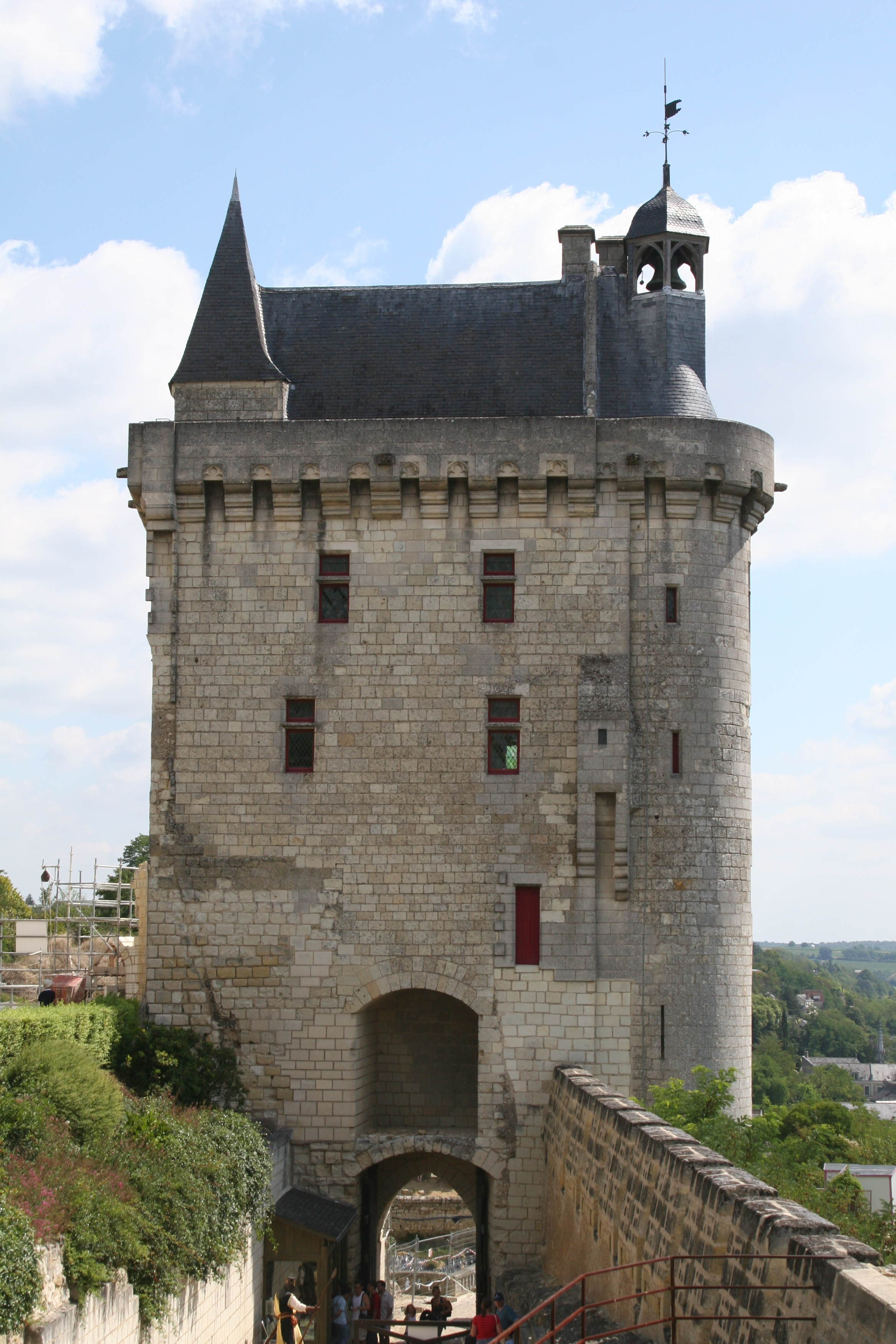 La Tour d'Horloge du château de Chinon